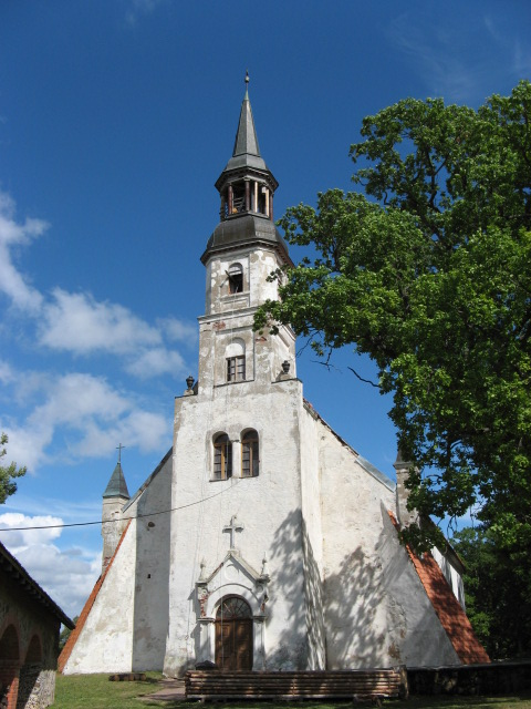 Burtnieki Latvia church